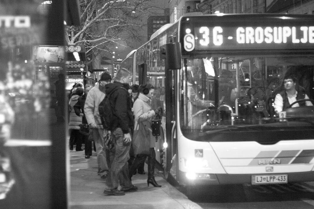 Ljubljana at night